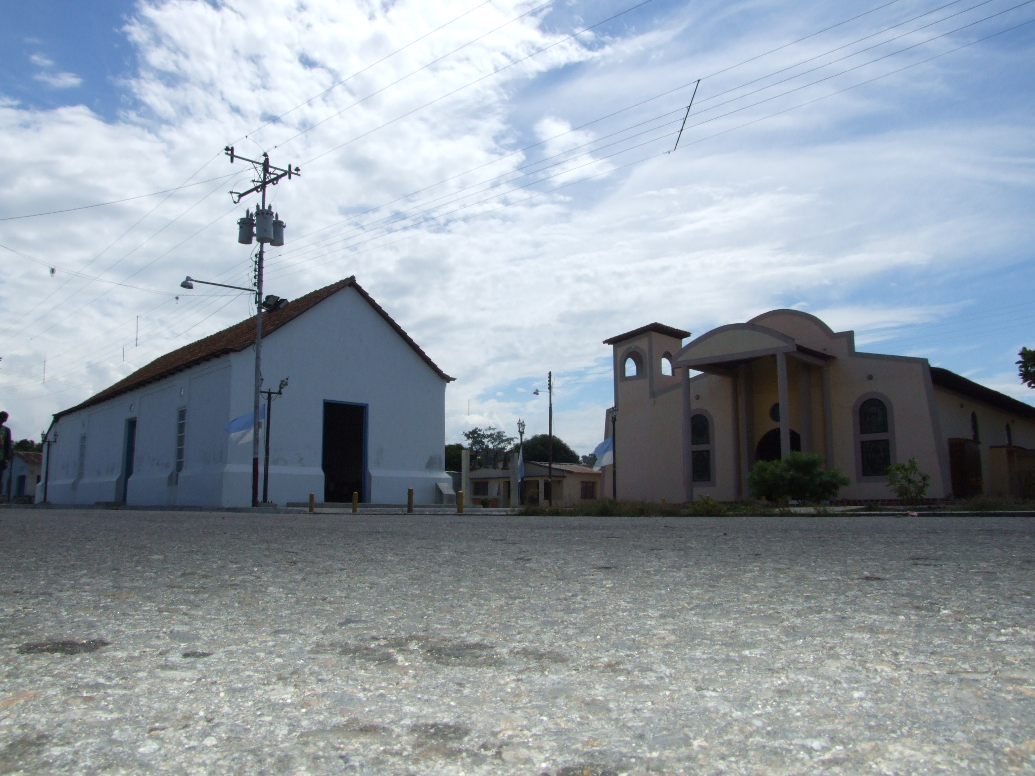 La antigua y la nueva iglesias juntas, a unos metros una de la otra como testimonio de las glorias del pueblo de Santa María de Heras, Zulia, Venezuela